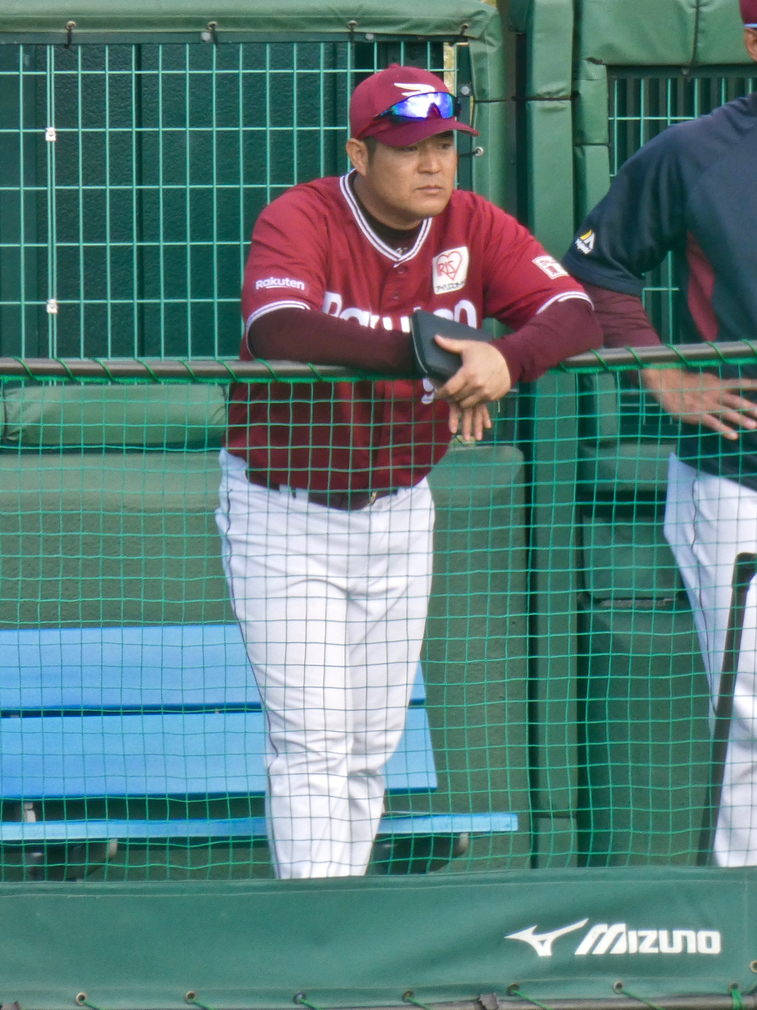 ヤクルト戸田球場にて